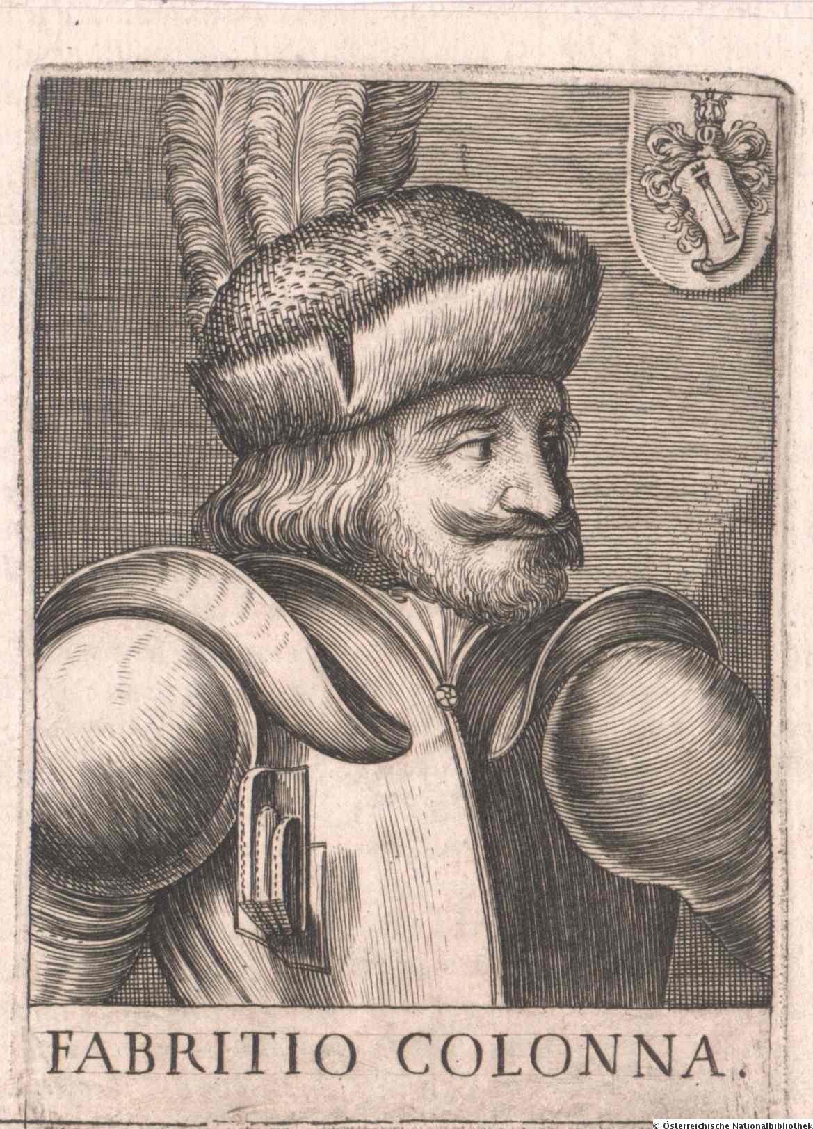 Портрет Фабрицио I Колонна (гравюра), XVI век. Автор неизвестен.